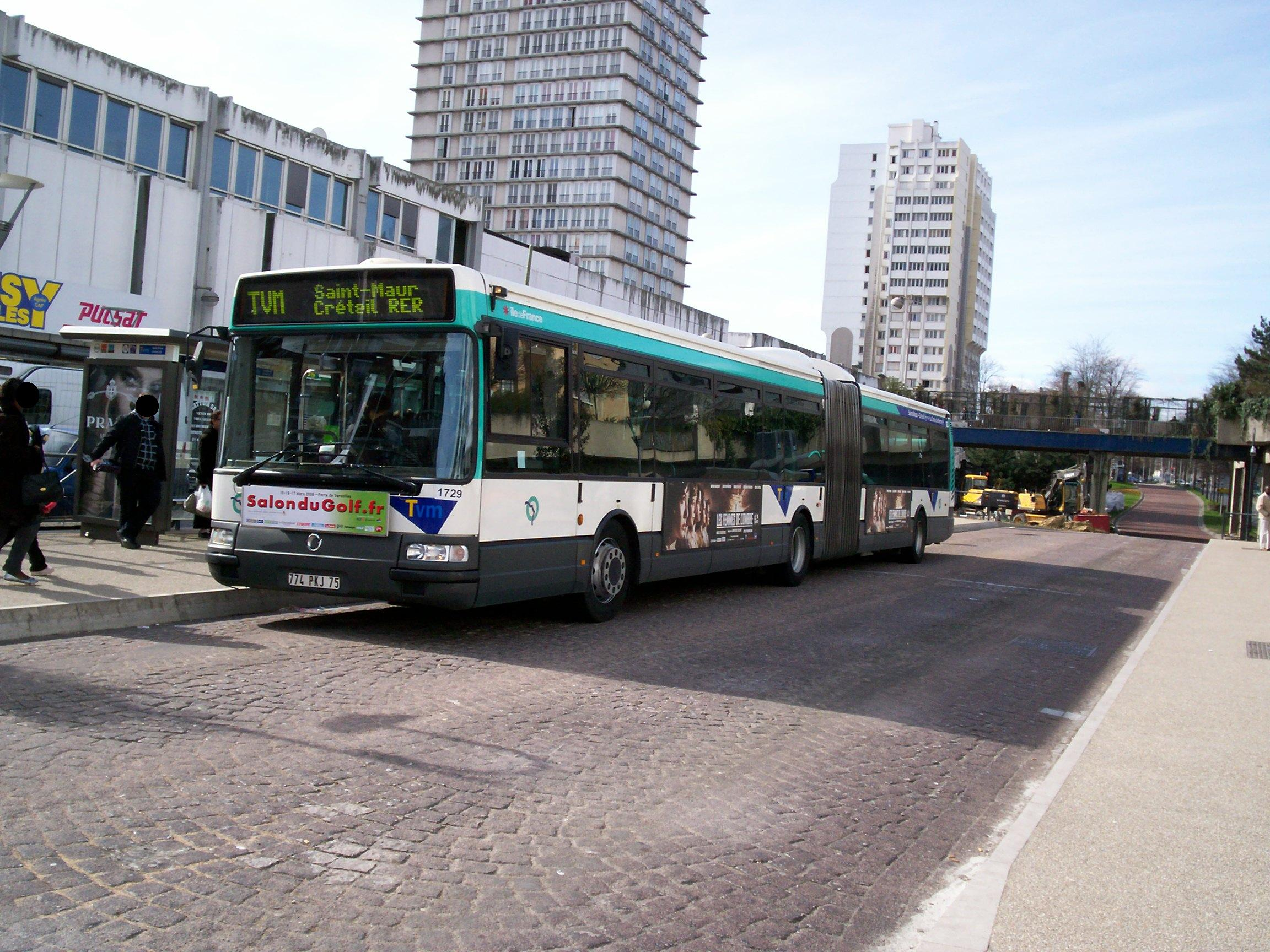 C'est au tour du second bus de desservir l'arrêt "Choisy-le-Roi"